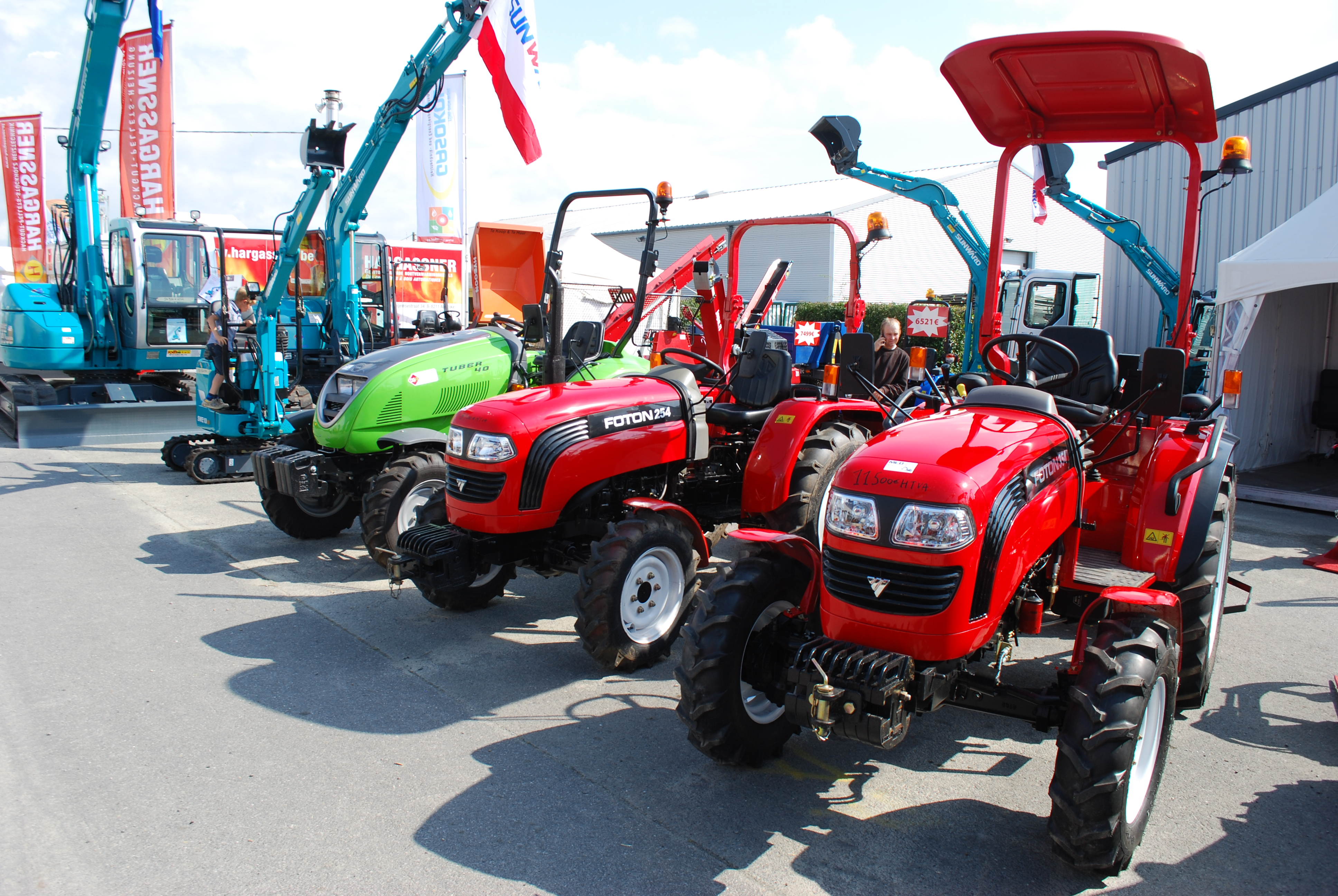 Vue de la Foire agricole de Libramont, dans le Luxembourg belge (82e édition en 2016).